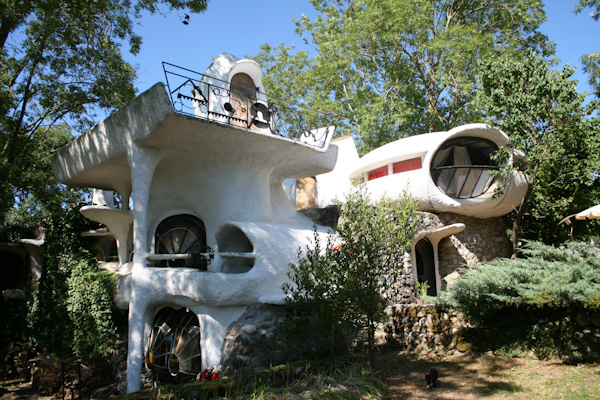 Maison construite par les architectes Claude Costy et Pascal hausermann